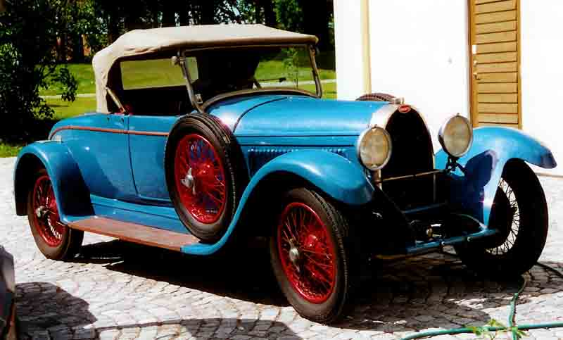 Bugatti Type 44 Roadster 1927